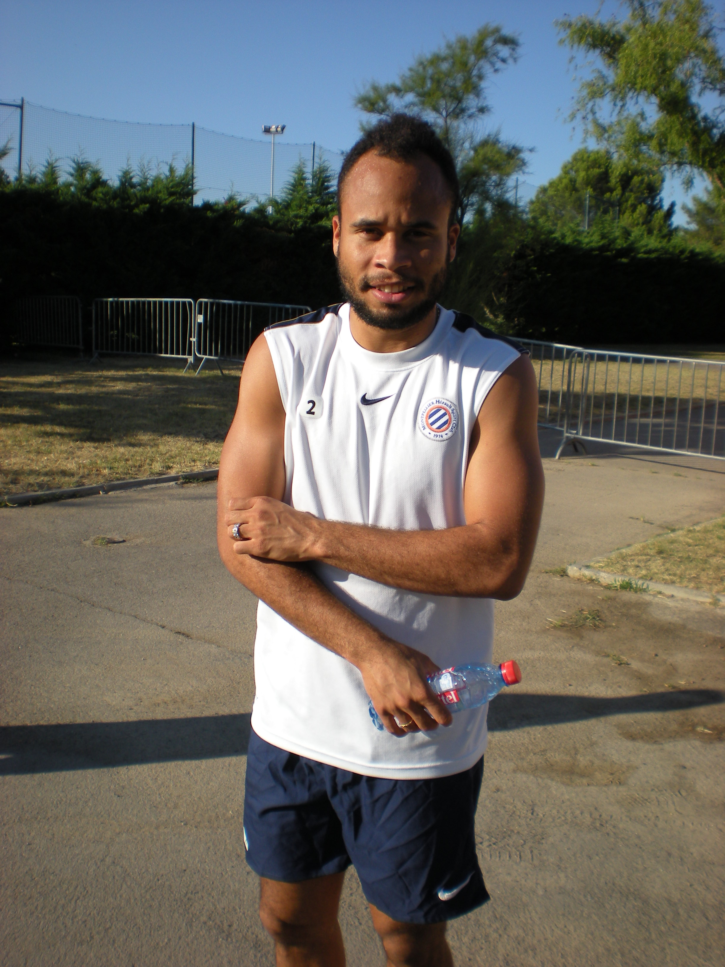 Gary Bocaly.